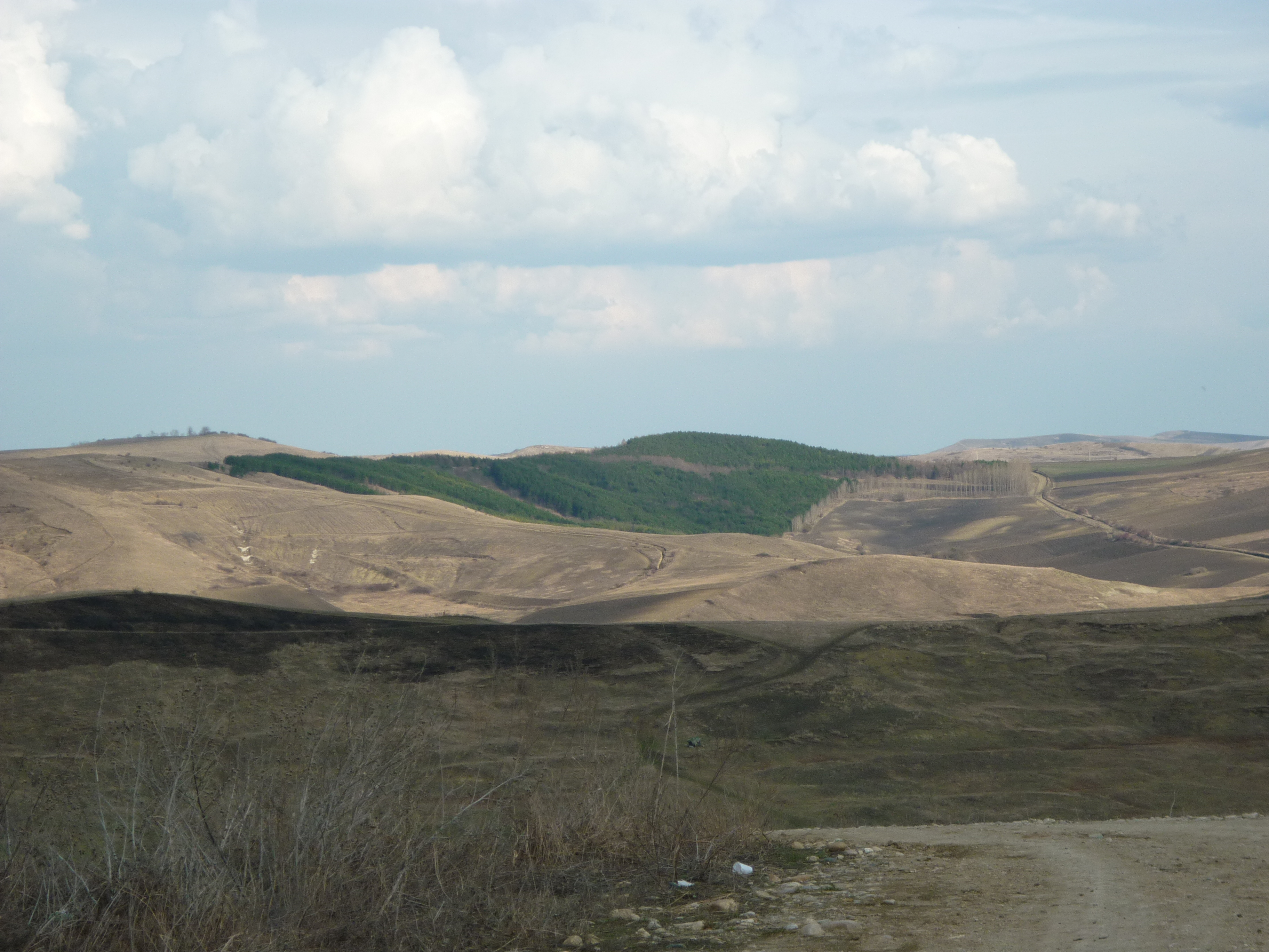 Pădurea Andiciului